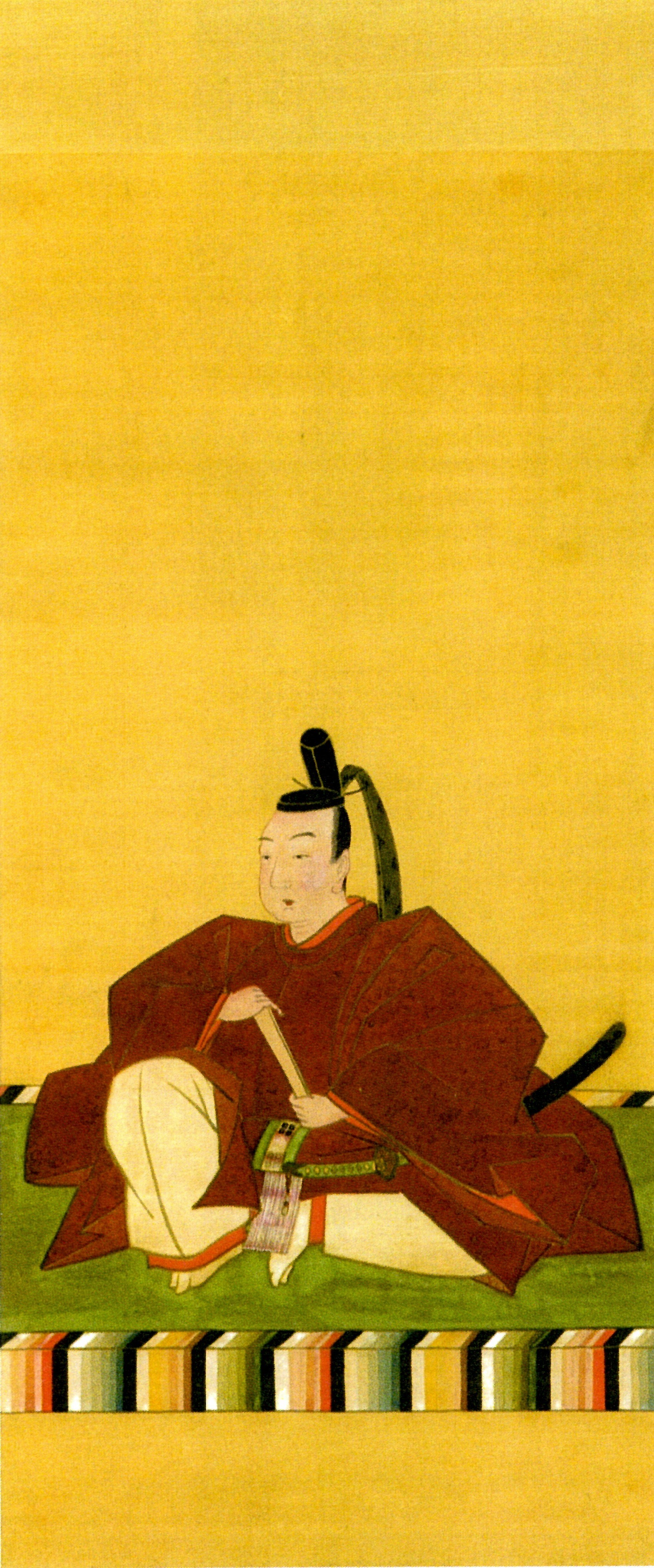 京極高或の肖像。